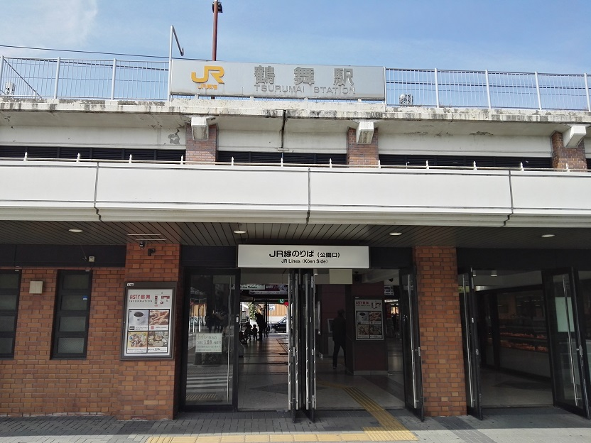 JR Tsurumai station building